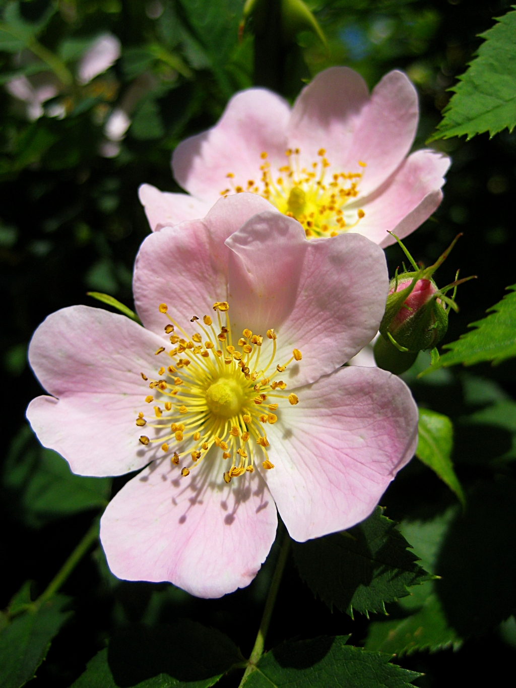 Divlja ruža u Rijeci